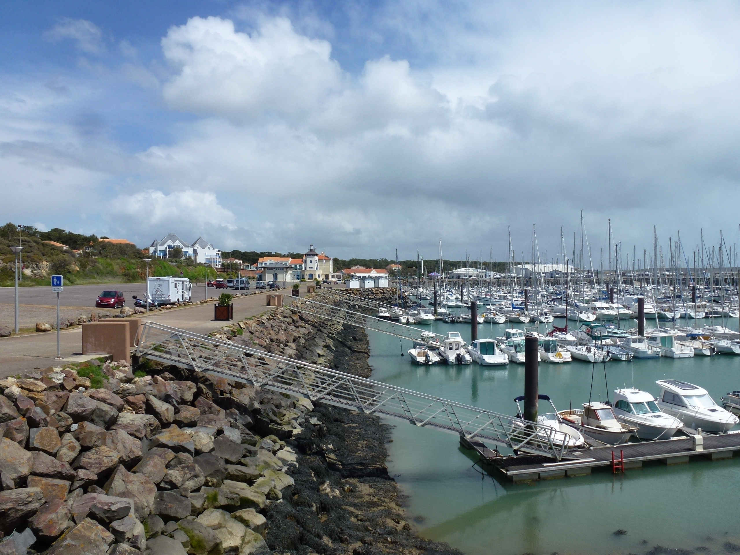 La marina du Port Bourgenay, et la côte Talmont-Saint-Hilaire (leTalmondais), Vendée.- France